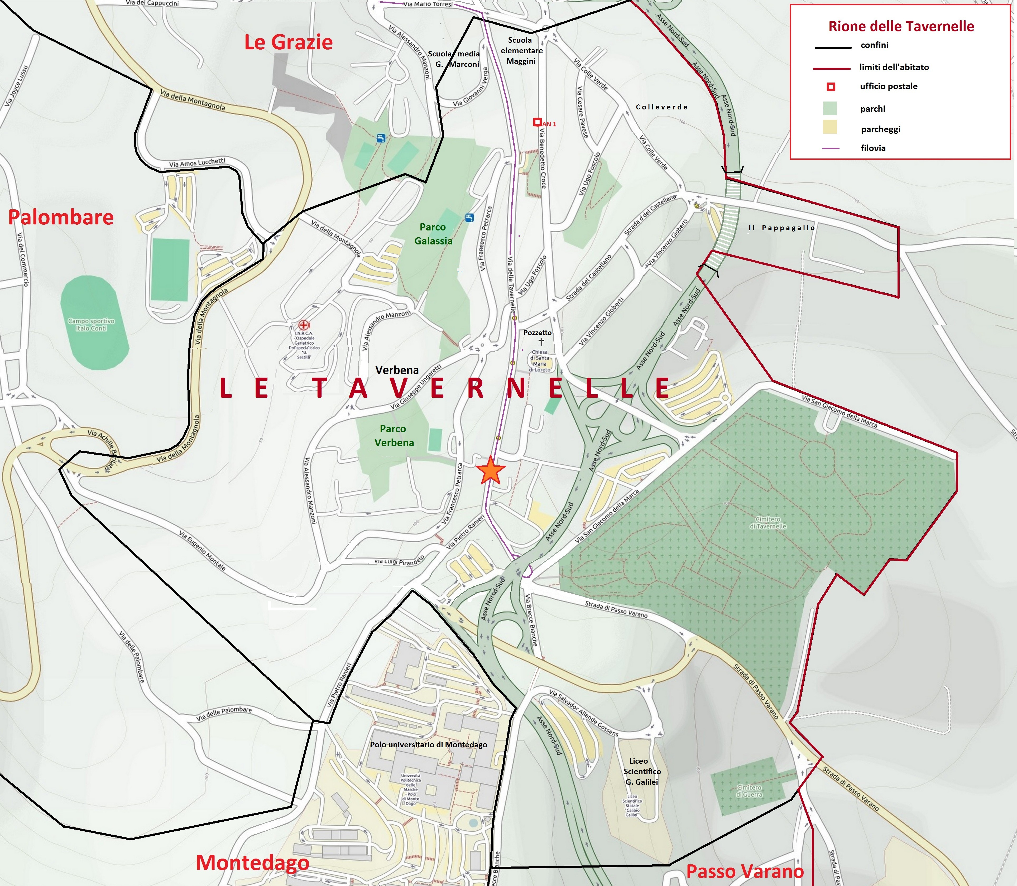 Mappa del Rione delle Tavernelle di Ancona, con i confini, le vie, le piazze e i parchi.